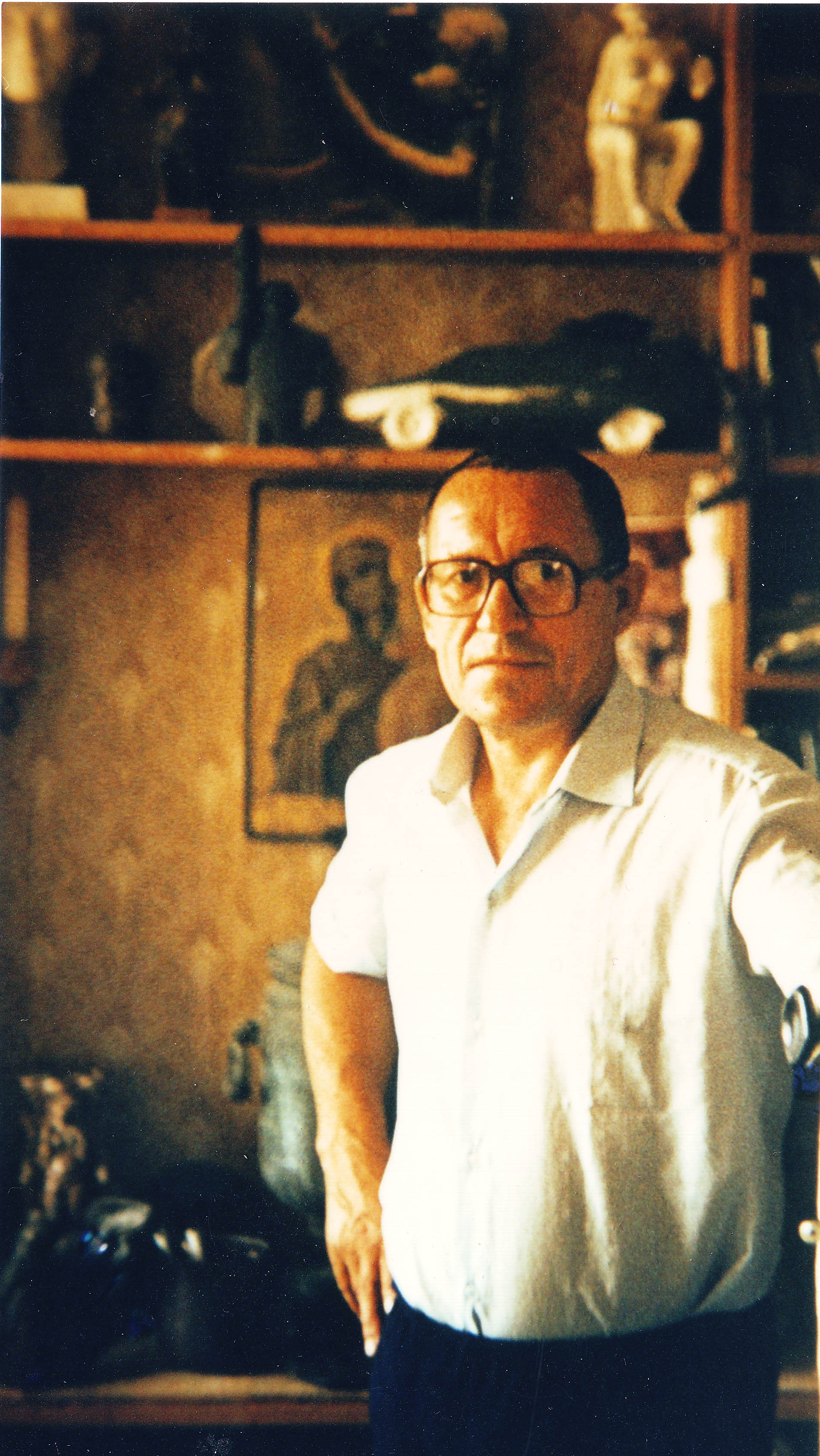 И.С. Фролов у входа в свою мастерскую в г. Фрязино.